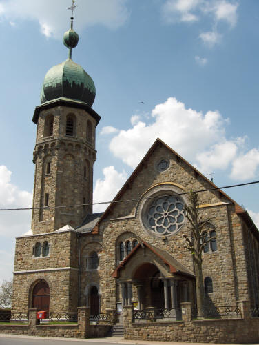 façade principale de l'église de Medell